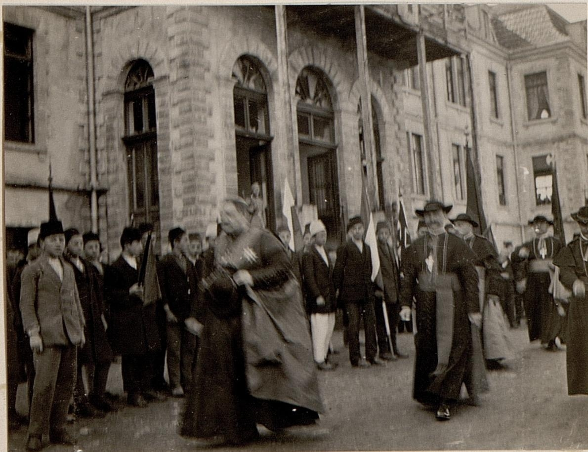 Erzbischof SEREGGI. Aufgenommen am 14. März 1916 in Skutari.